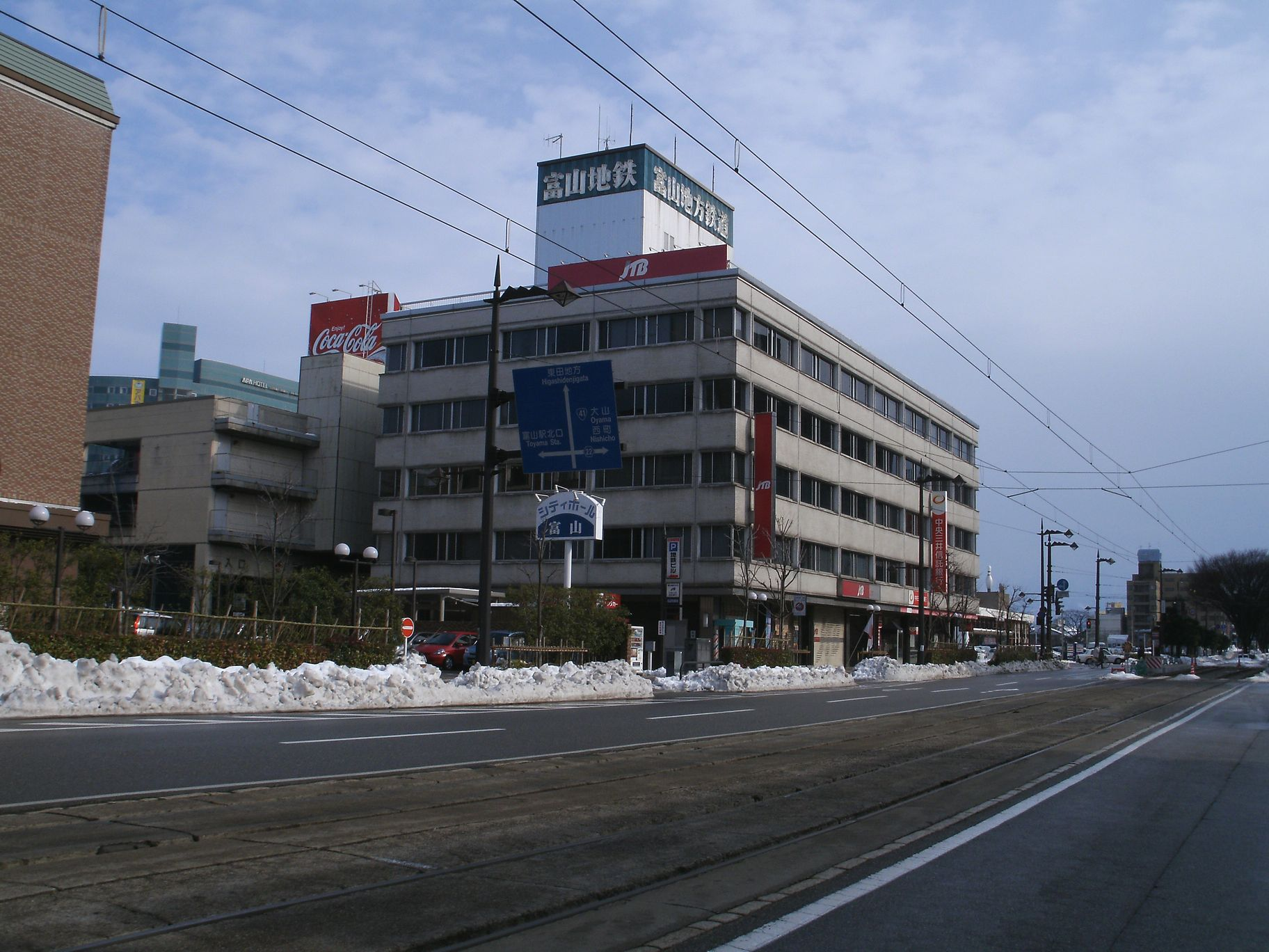 地鉄ビル（富山地方鉄道本社） 路上右端に地鉄ビル前電停（南富山駅前方面）が見える